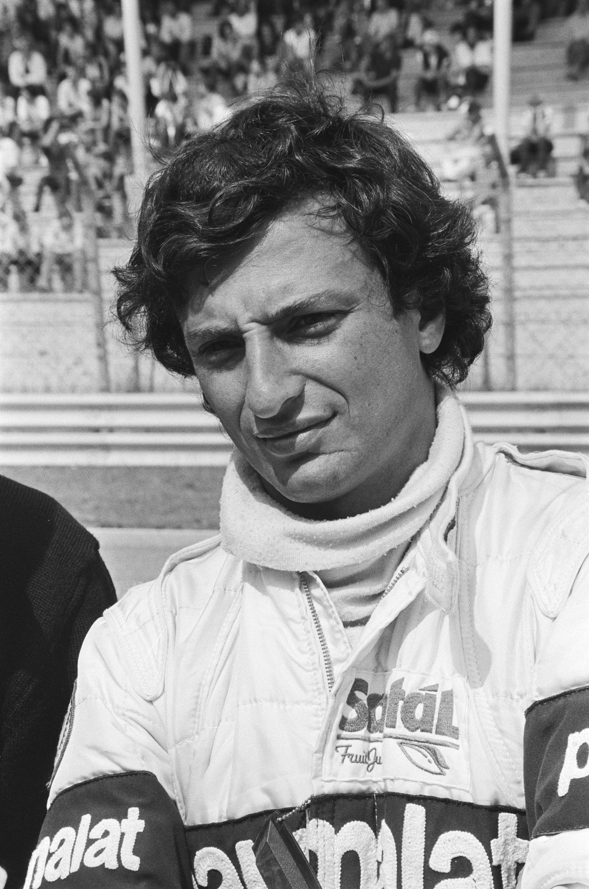 Collectie / Archief : Fotocollectie Anefo Reportage / Serie : [ onbekend ] Beschrijving : Grand Pris van Nederland te Zandvoort; koppen coureurs, Riccardo Patrese Datum : 3 juli 1982 Locatie : Noord-Holland, Zandvoort Trefwoorden : coureurs Persoonsnaam : Grand Prix van Nederland Fotograaf : Dijk, Hans van / Anefo Auteursrechthebbende : Nationaal Archief Materiaalsoort : Negatief (zwart/wit) Nummer archiefinventaris : bekijk toegang 2.24.01.05 Bestanddeelnummer : 932-2367